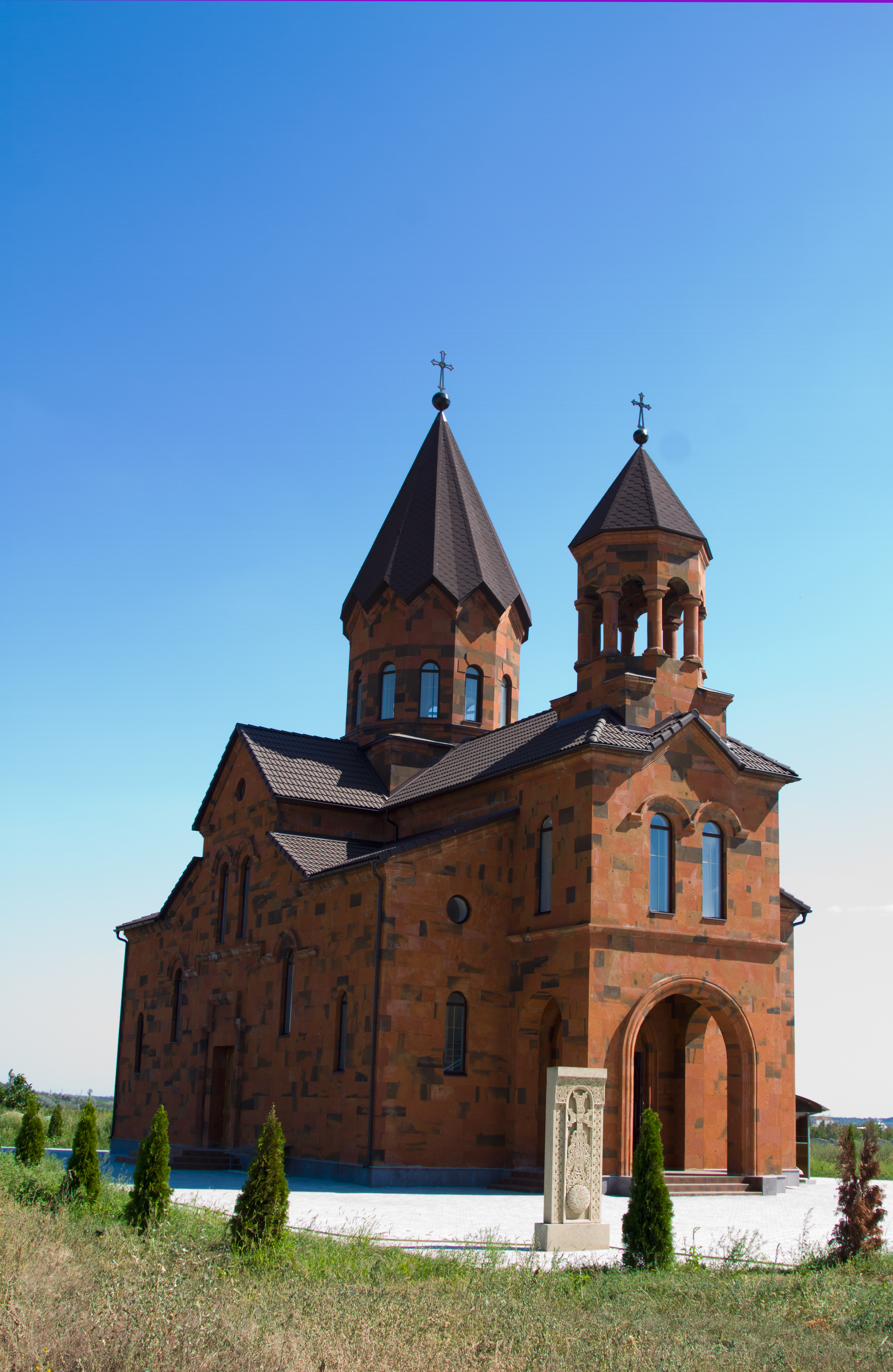 Церква Сурб Геворг. Архітектор Попов В., Миколаїв